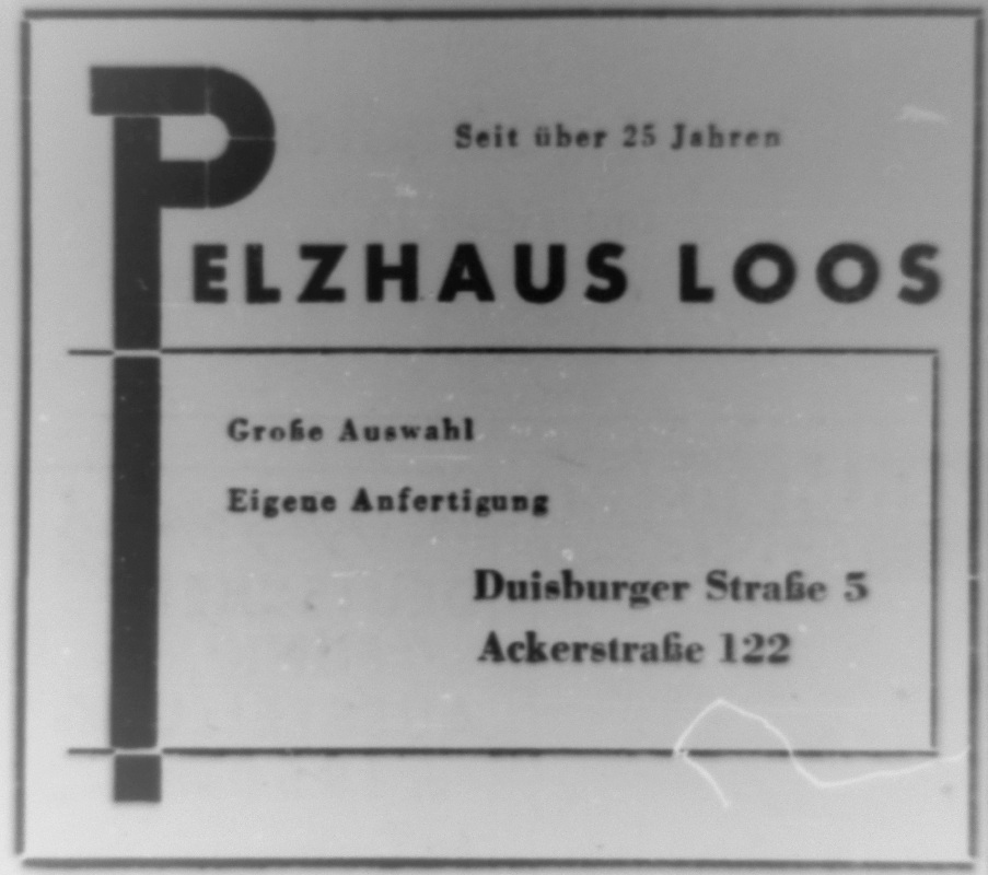 Pelzhaus Loos, Düsseldorf, Rheinische Post, Anzeige 19. August 1950.